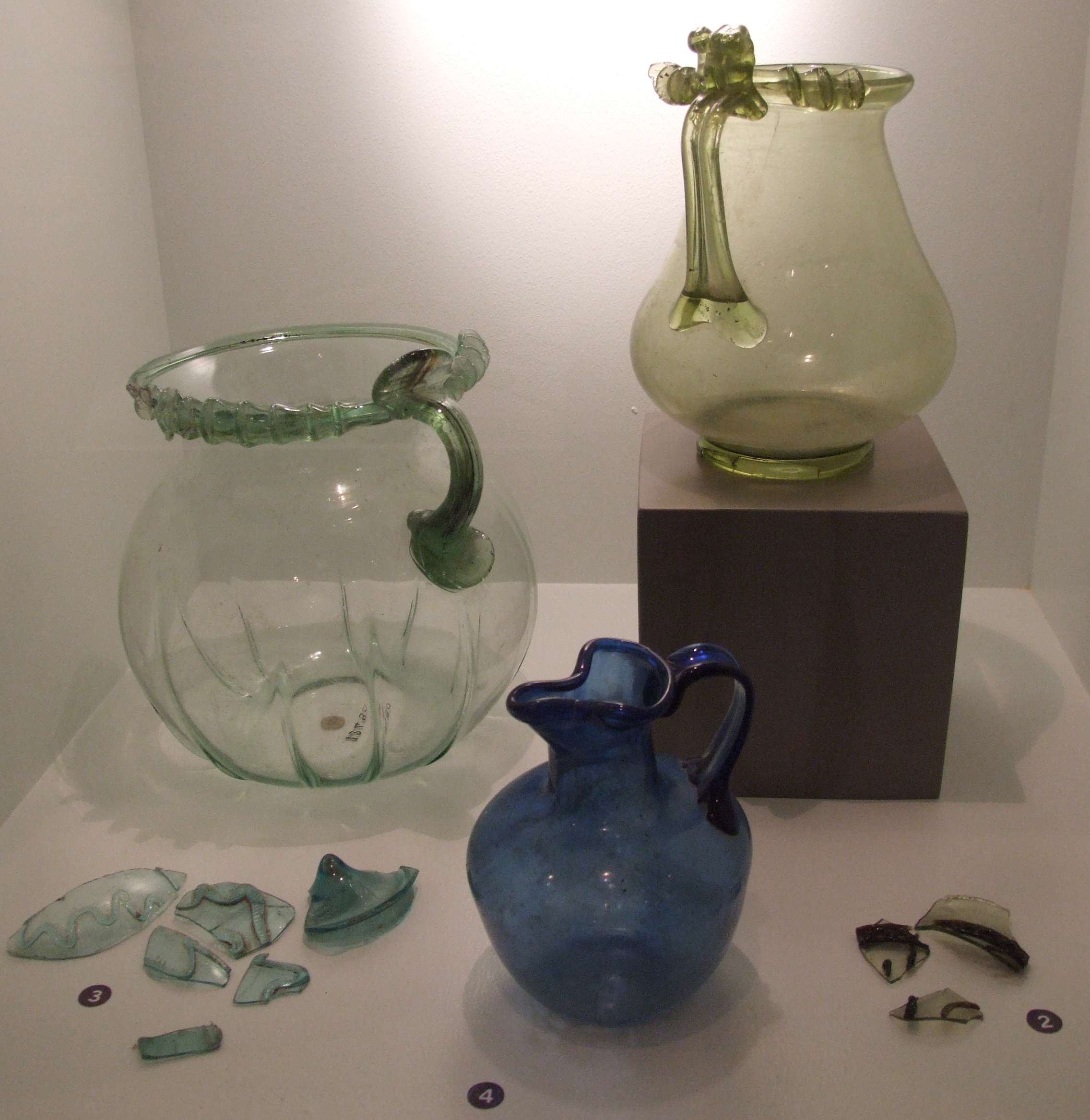 Drei Glaskrüge aus Pompeii, 79 n.Chr., zwei Gruppen Fragmente; Pompeii-Ausstellung 2007, Europäischer Kulturpark Bliesbruck-Reinheim